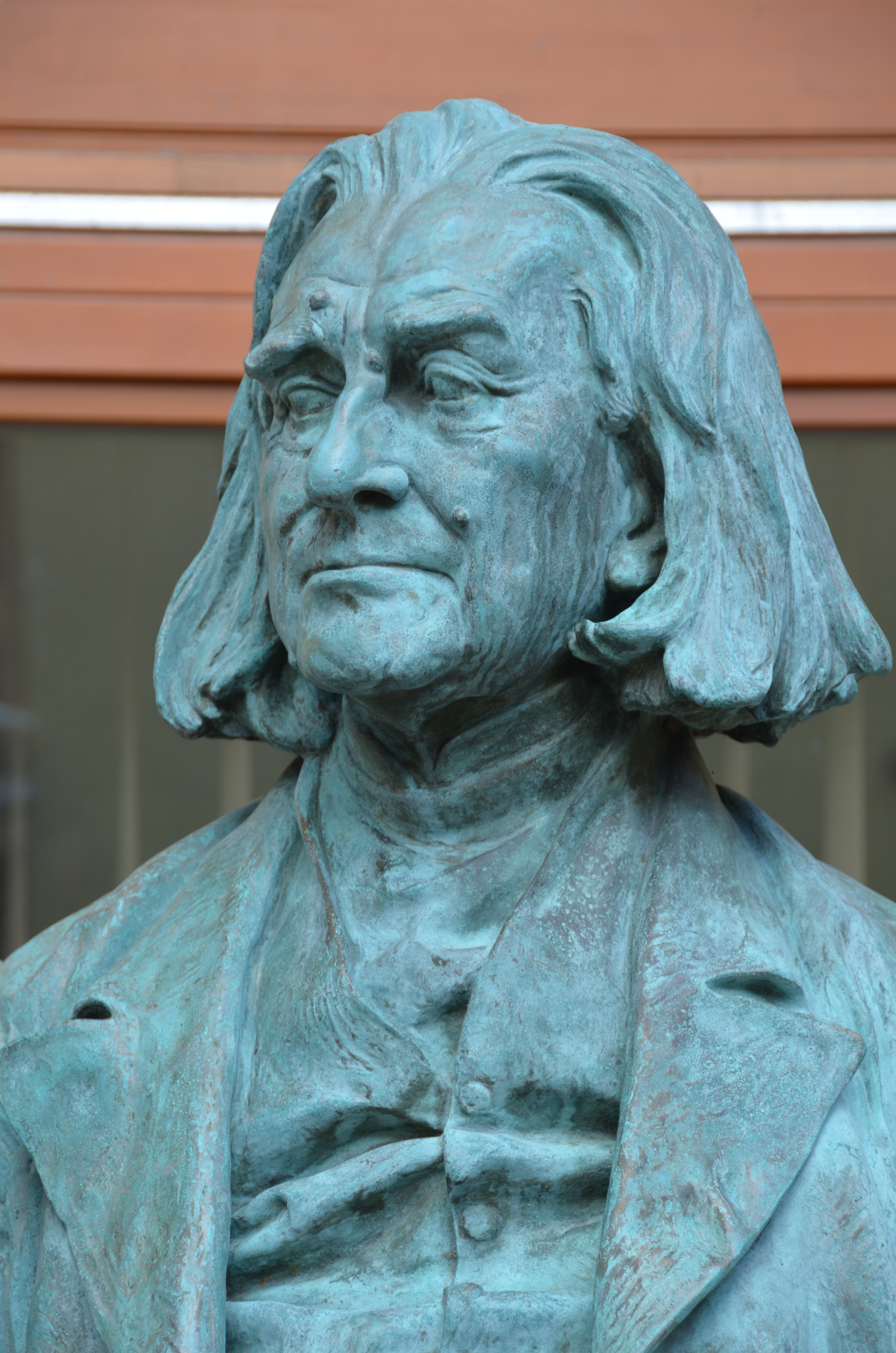 Estàtua de Franz Liszt a Sopron